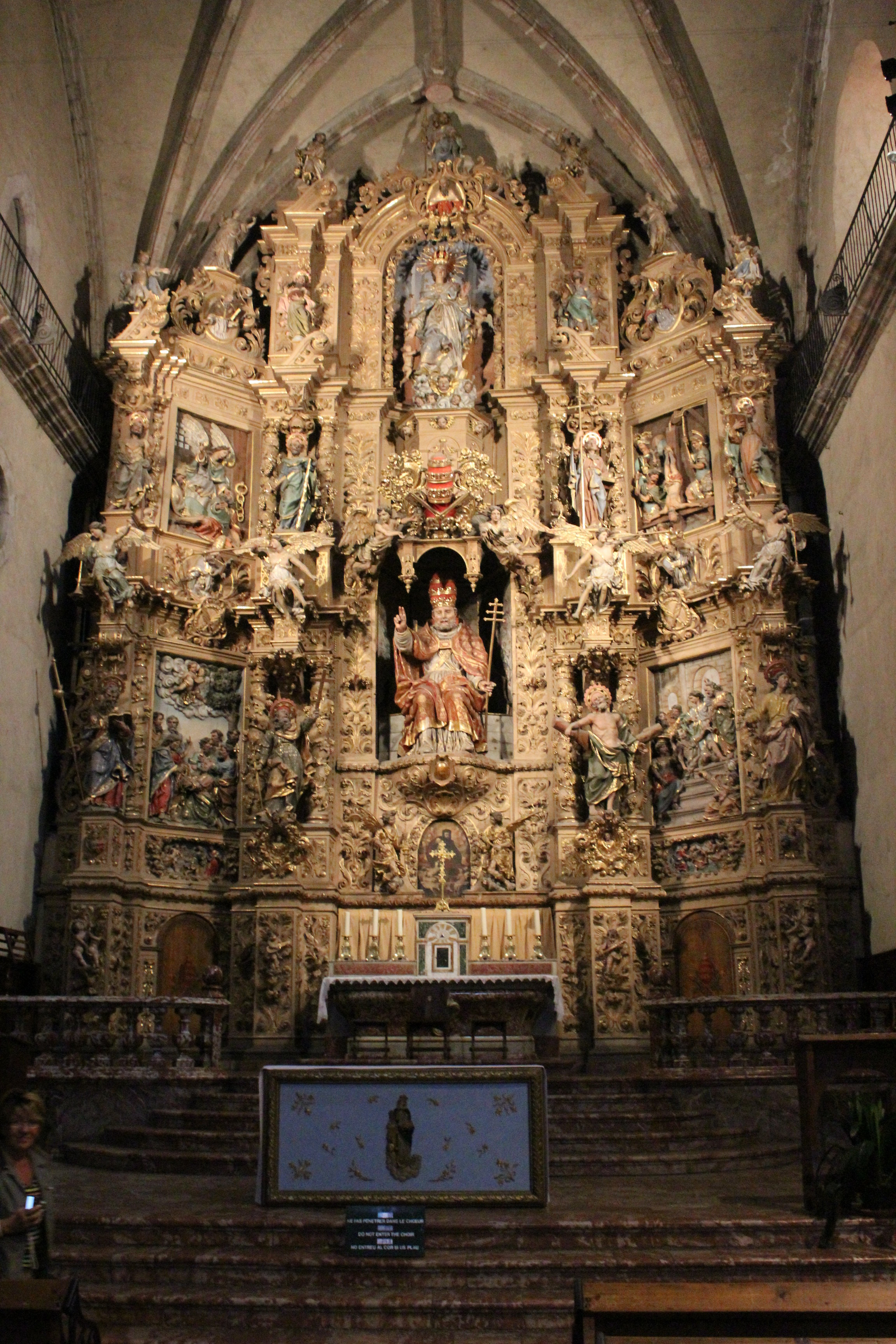 Prades (Pyrénées-Orientales, France), église Saint Pierre, retable du maître-autel Le Triomphe de St Pierre, le plus grand retable baroque de France.